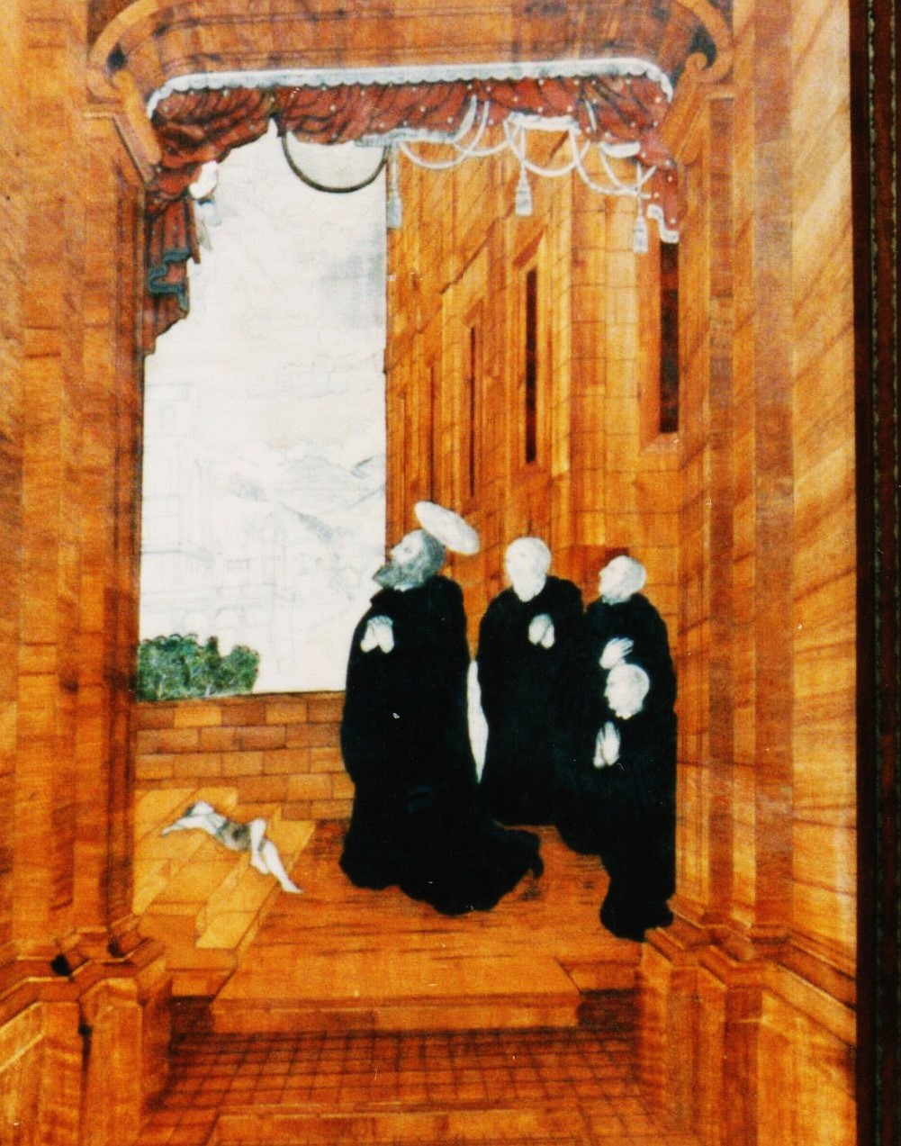 Stiftskirche Banz, Chorgestühl (1750): Benedikt erweckt einen toten Knaben zum Leben. (Gregor der Große: Buch II der Dialoge, Kap. XXXII)